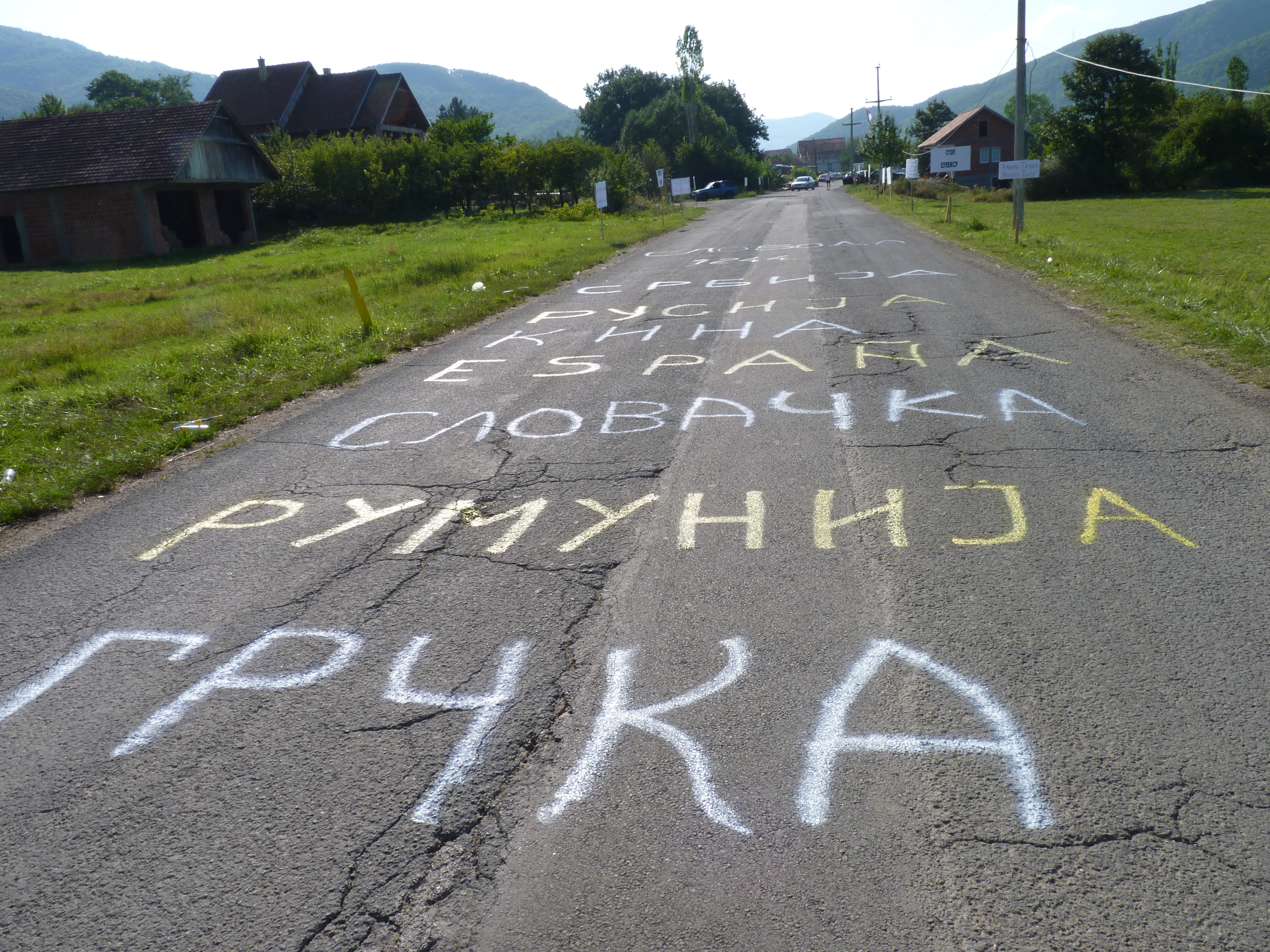 Zemlje na asfaltu u Zupču.